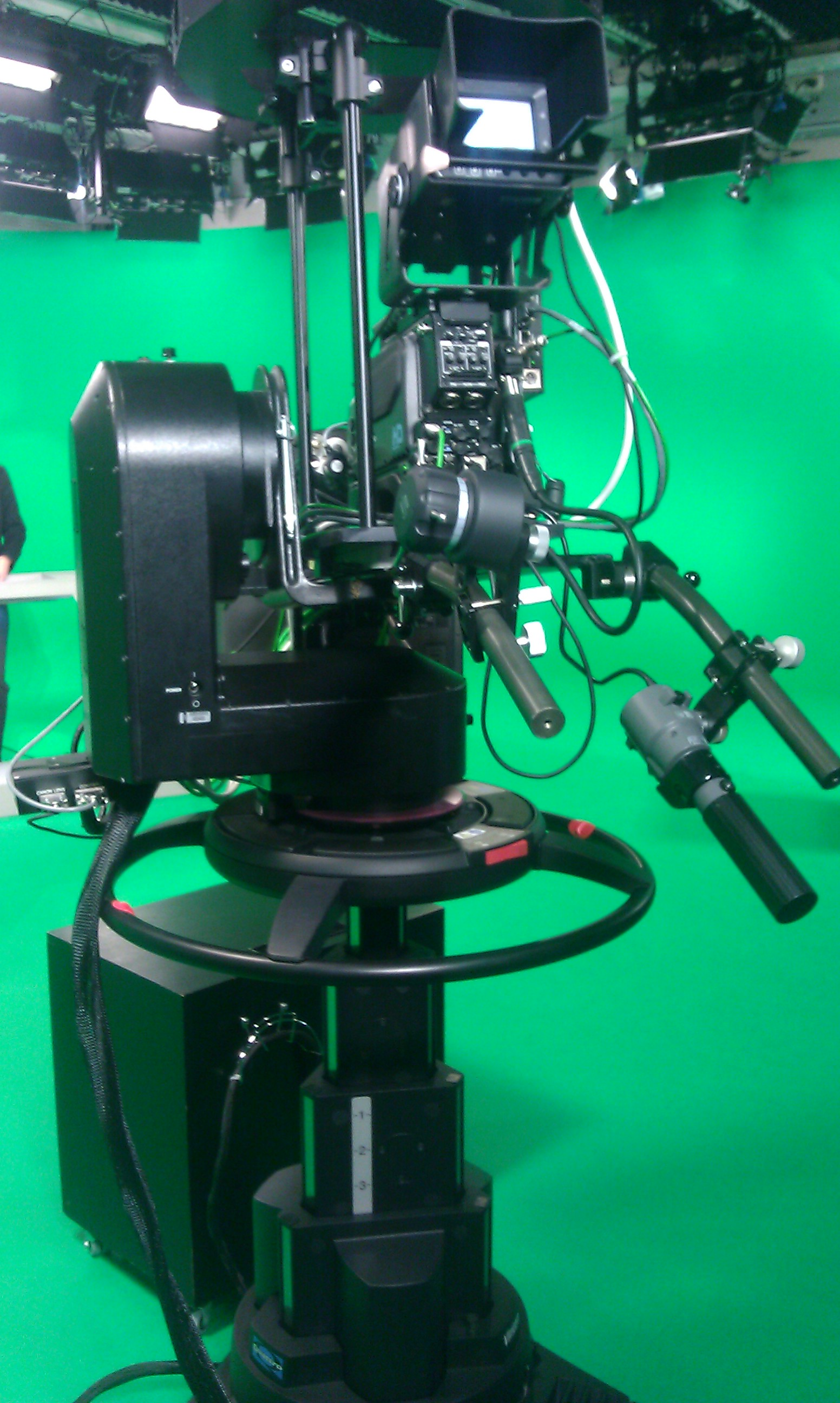 ORF-Studio (Greenscreen), Studio-Kameras